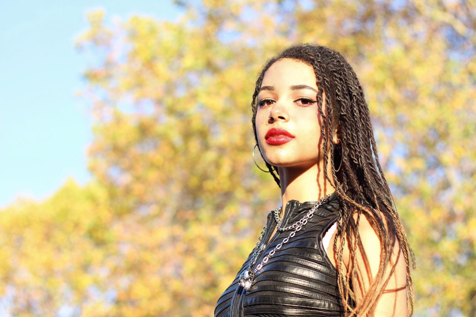 Luna Baptiste Schaller, deutsche Schauspielerin